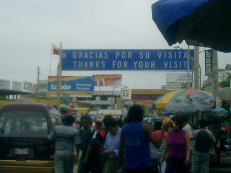 vista del puente internacional de Aguas Verdes